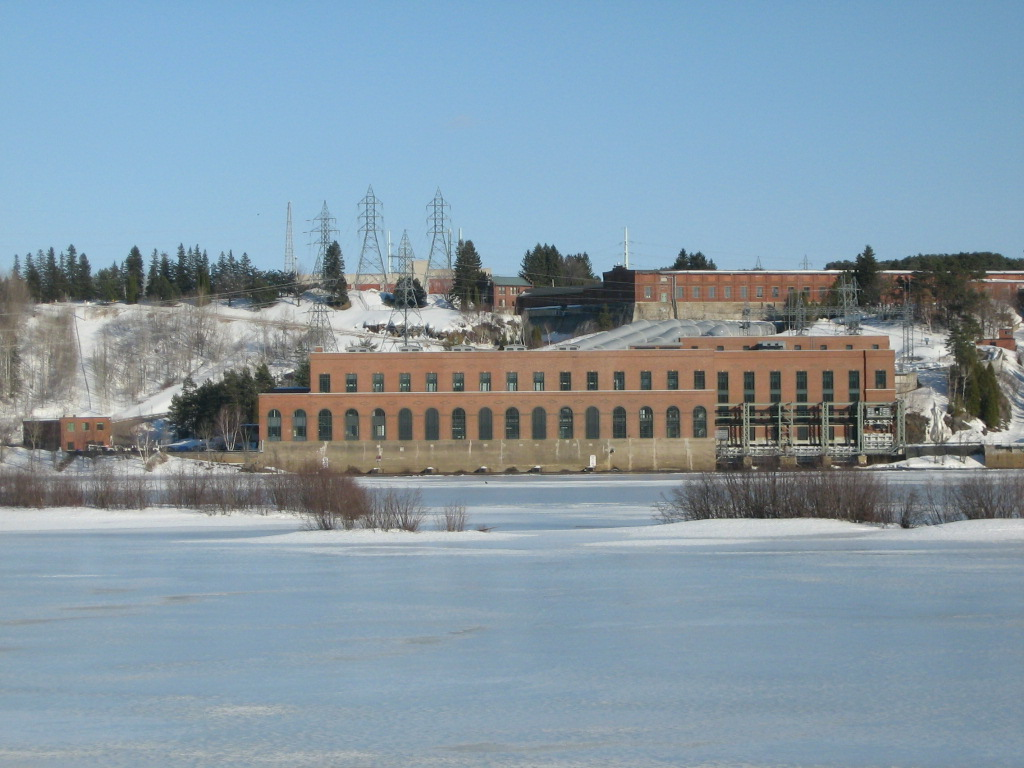 Centrale Shawinigan-2, à Shawinigan, Québec (Canada)